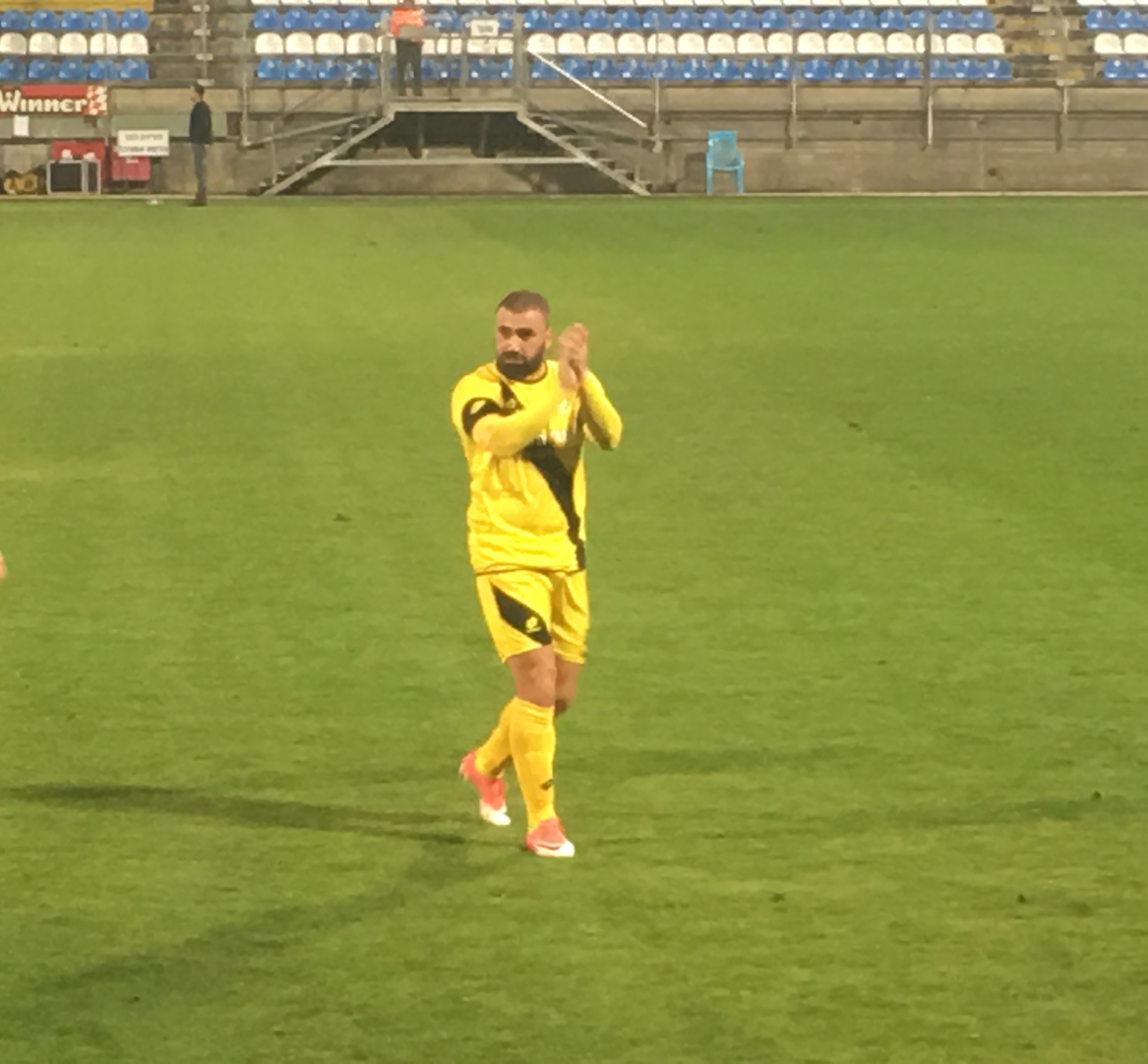 ערן לוי במשחקה של מכבי נתניה נגד קרית שמונה בחודש פברואר 2018